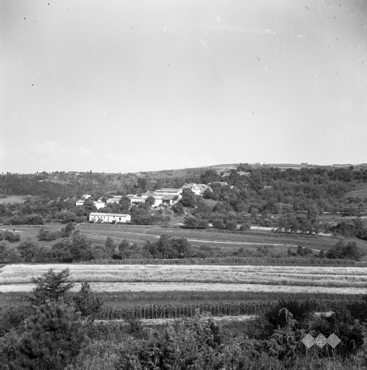 Pogled na Velike Loče.